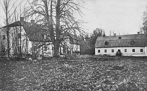 Holbonäs säteri huvudbyggnad (brann ner 12/6 1934)